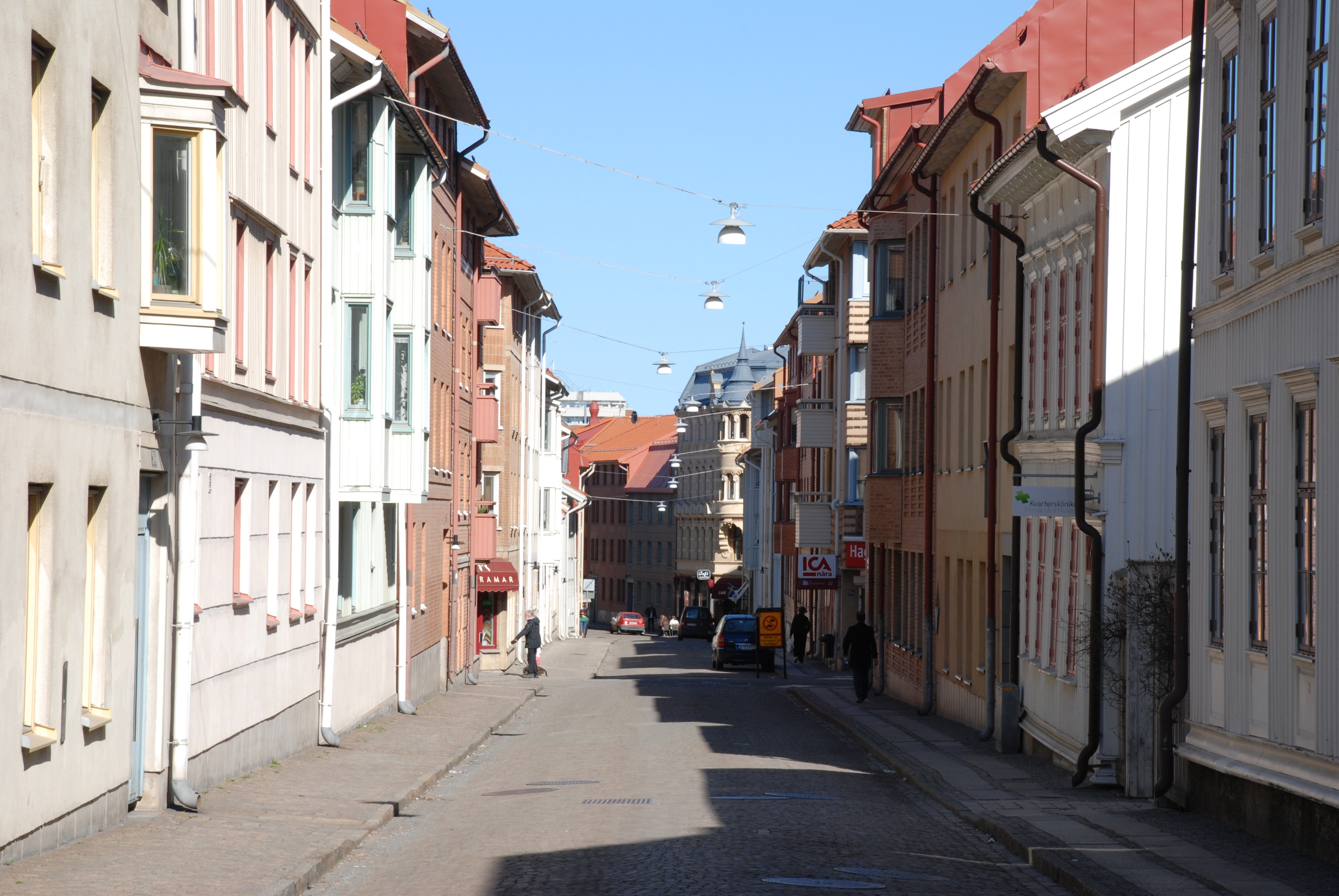 Husargatan Haga i Göteborg sedd från Skanstorget.